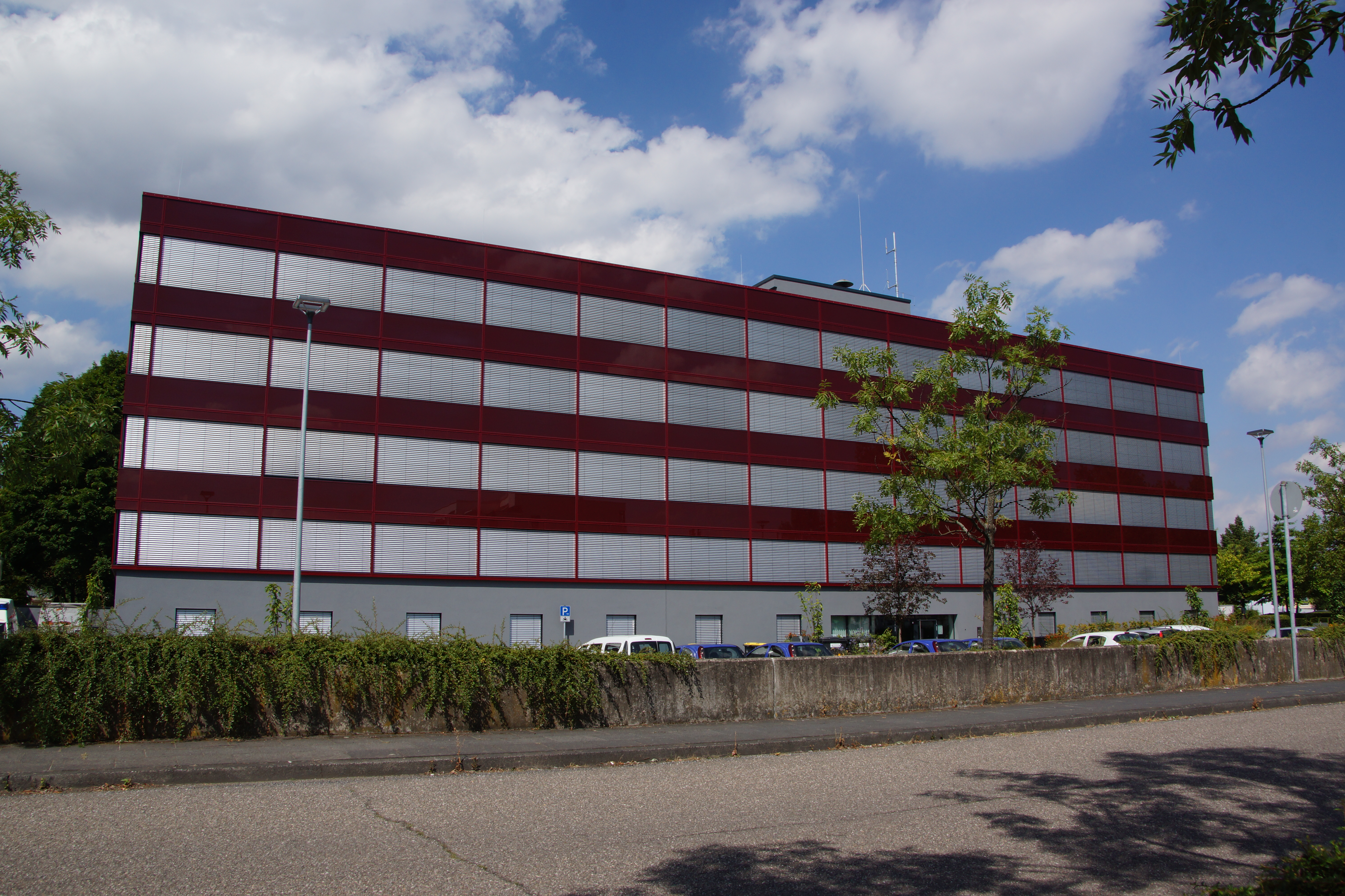 Rathaus in Bornheim